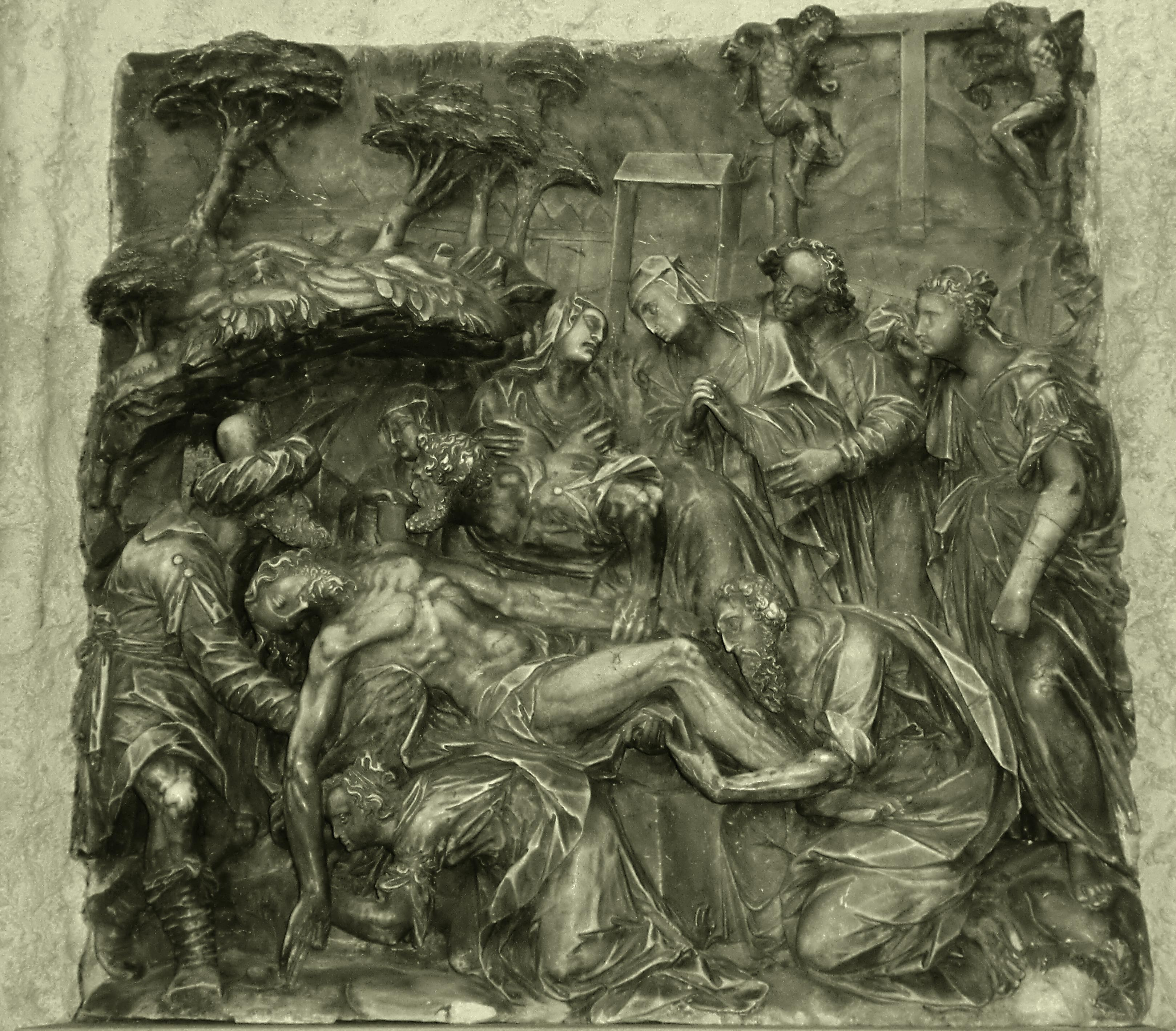 Sophienkirche Dresden: 1613,Relief Marcus Gerstenberger "Grablegung Christi", Epitaph für Marcus Gerstenberger in der Dresdner Kreuzkirche